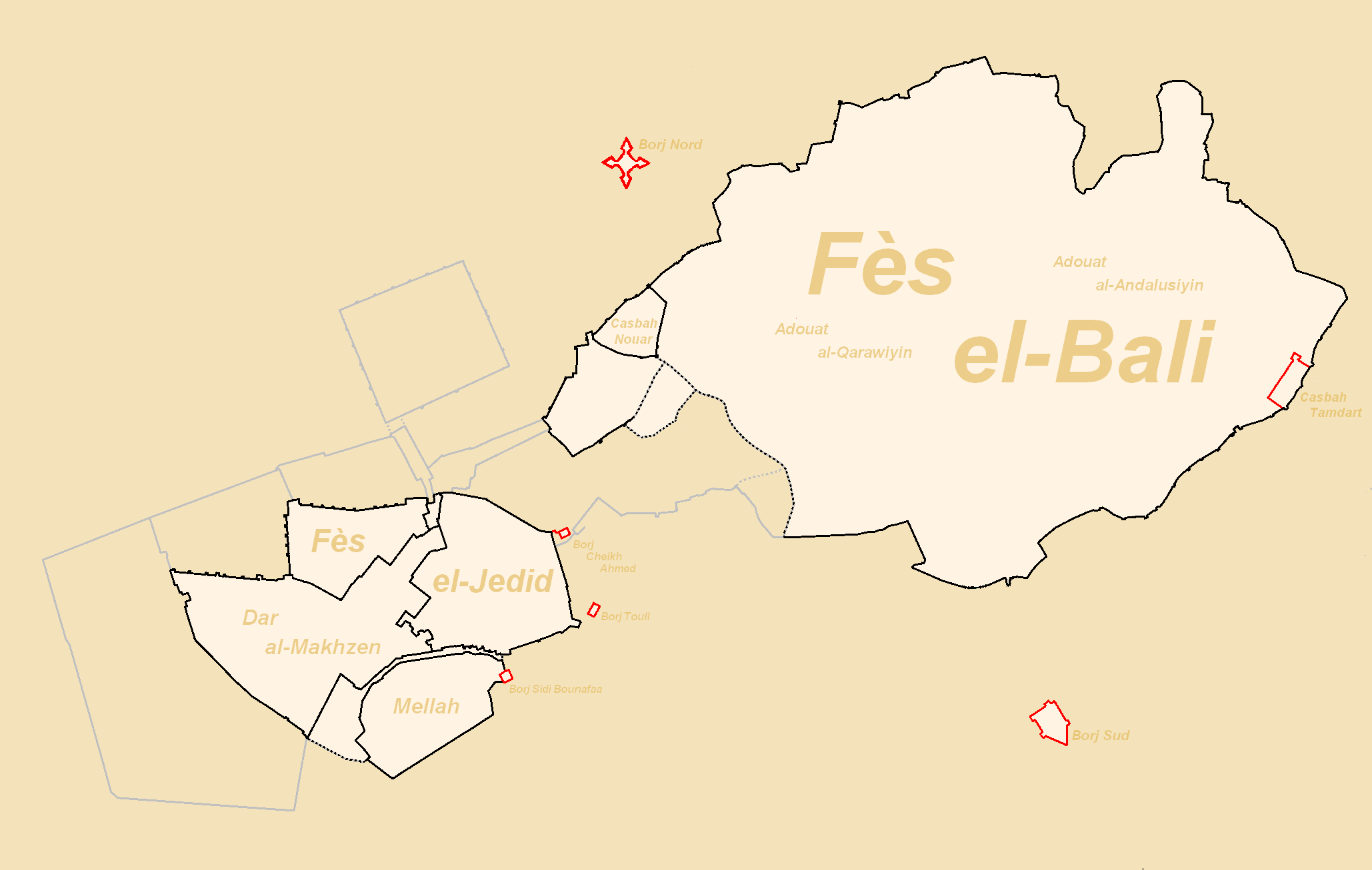 Plan des fortifications de Fès construites sous les Saadiens.